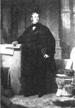 Ernst Friedrich Zwirner, Tafelmalerei